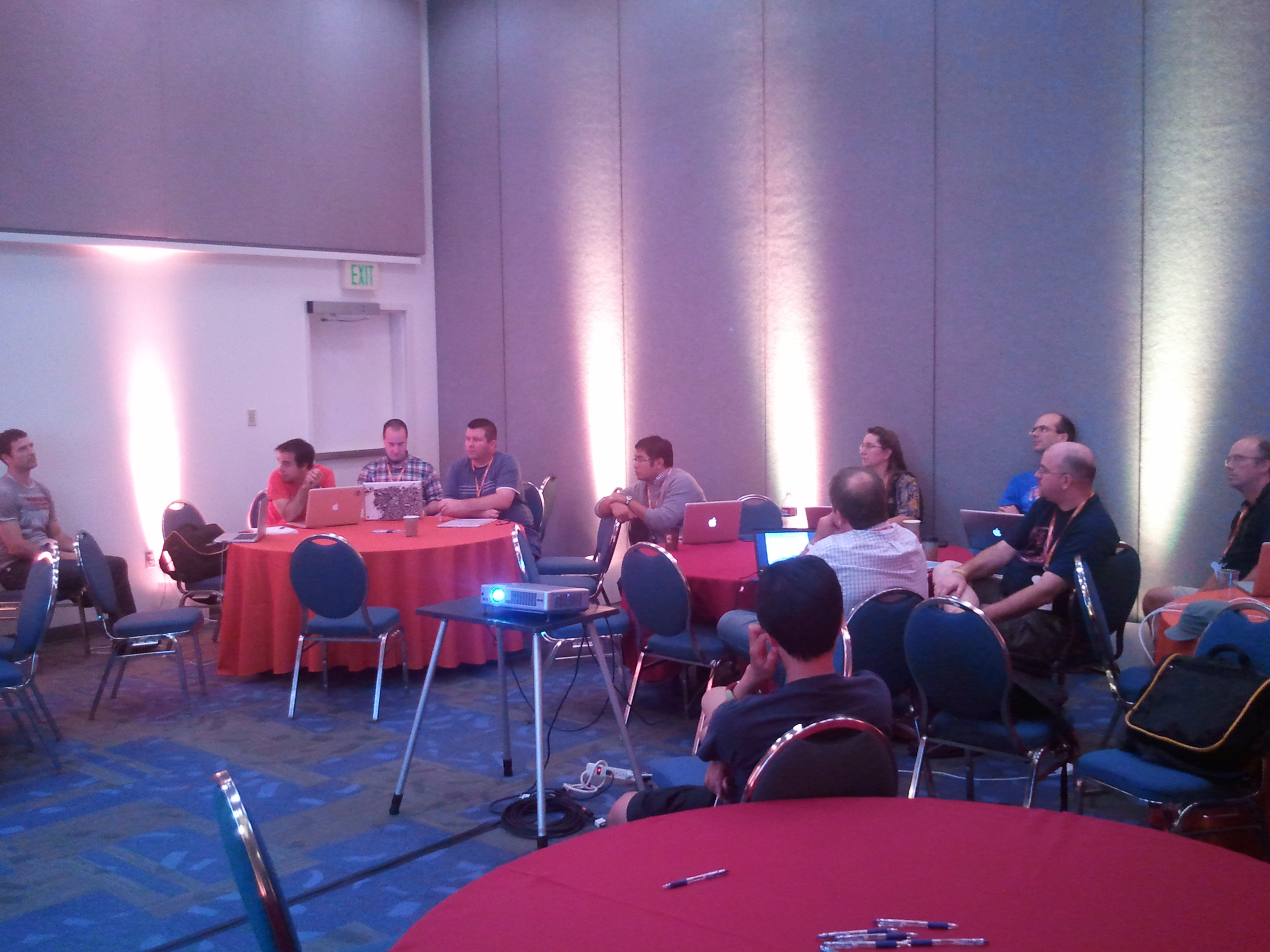 David Aschler Réunion de l'équipe Thunderbird le 13 septembre 2011